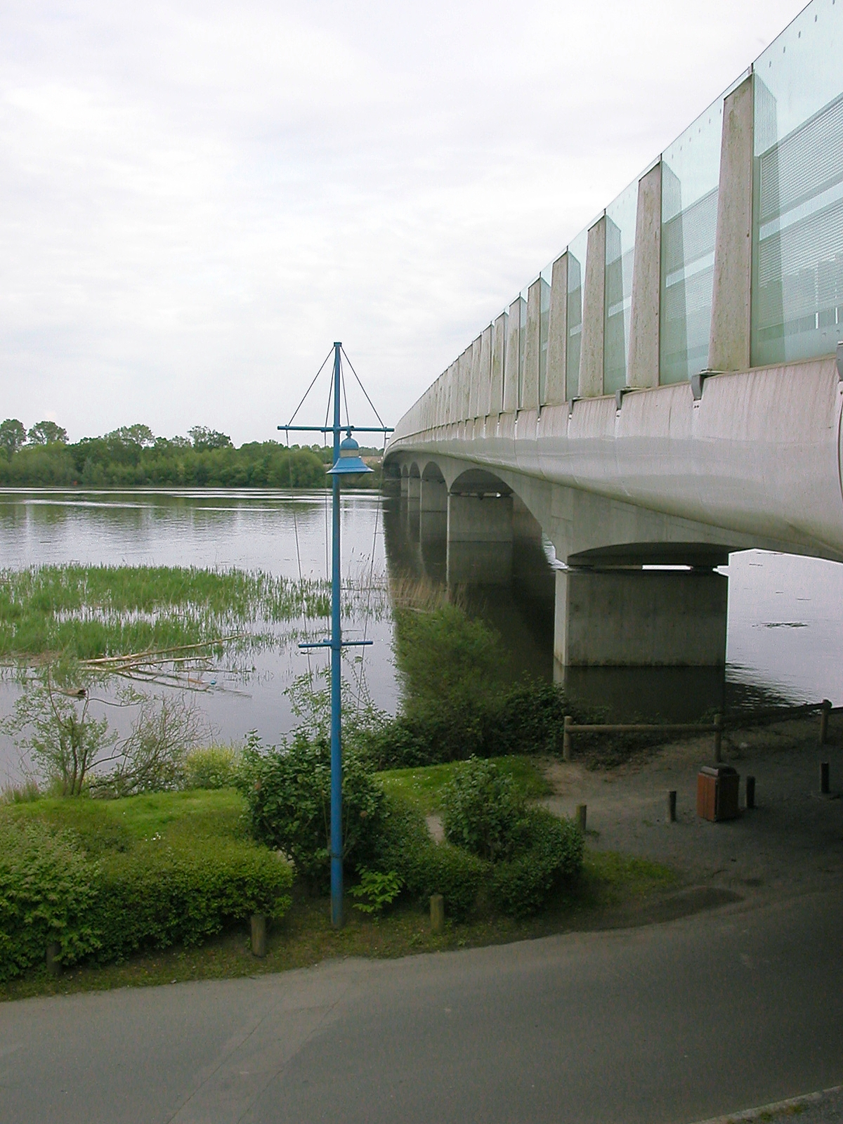 Les ponts de Bellevue du boulevard périphérique de Nantes vus depuis la rive nord de la Loire à Sainte-Luce-sur-Loire